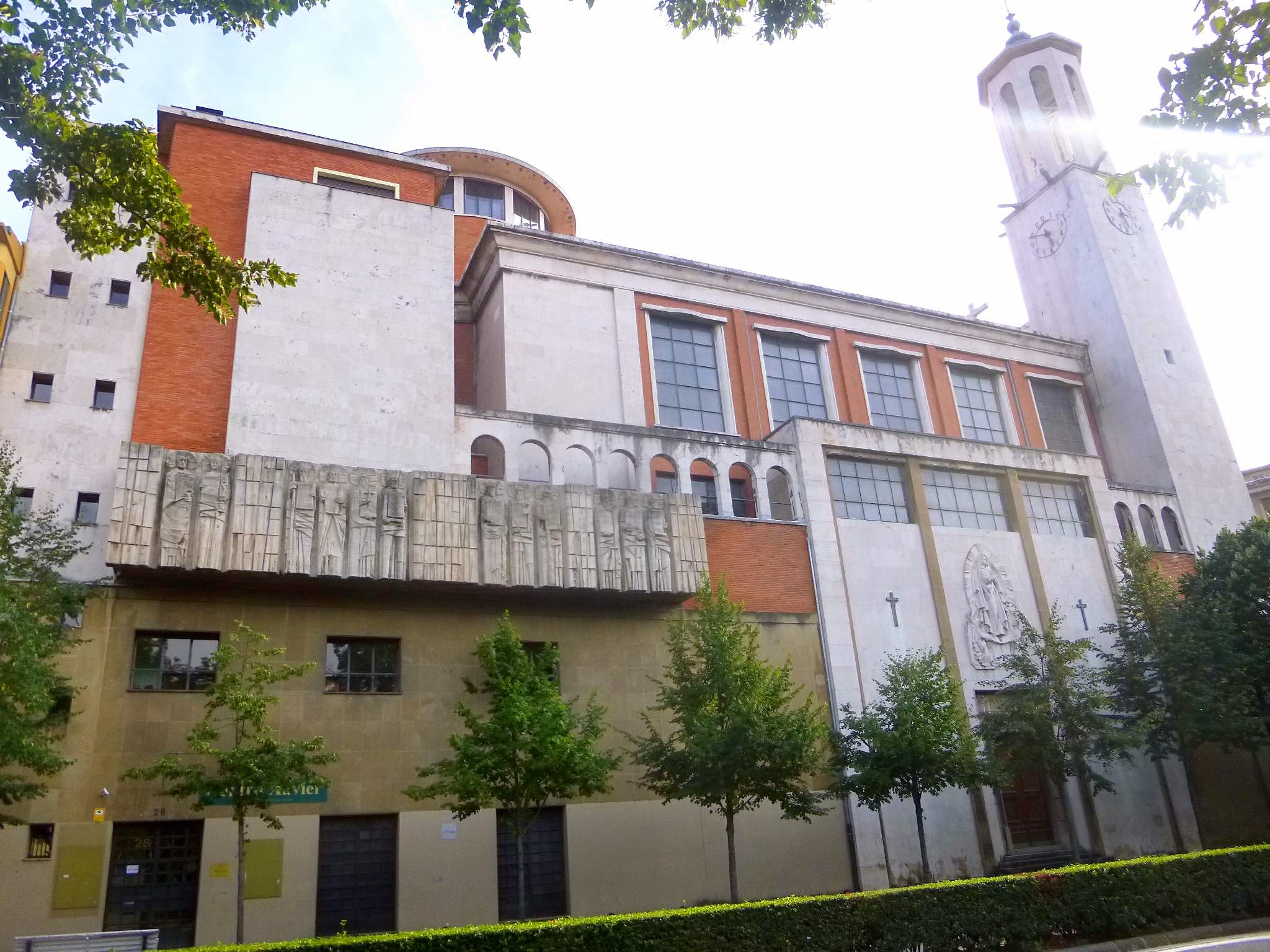 Iglesia de San Francisco Javier (Pamplona)